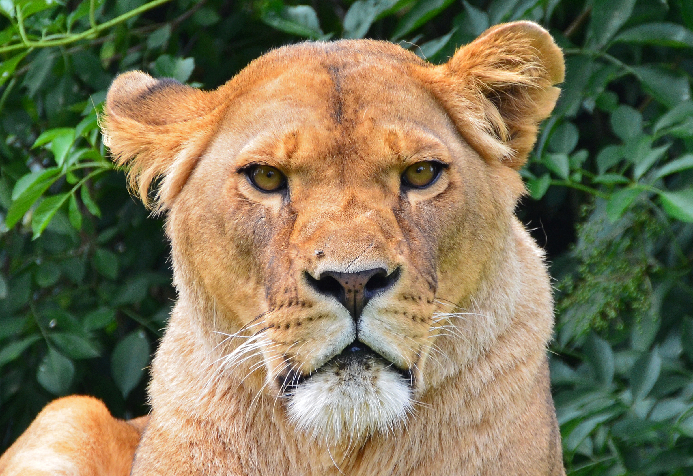 Une lionne photographiée au Parc des Abrets, France